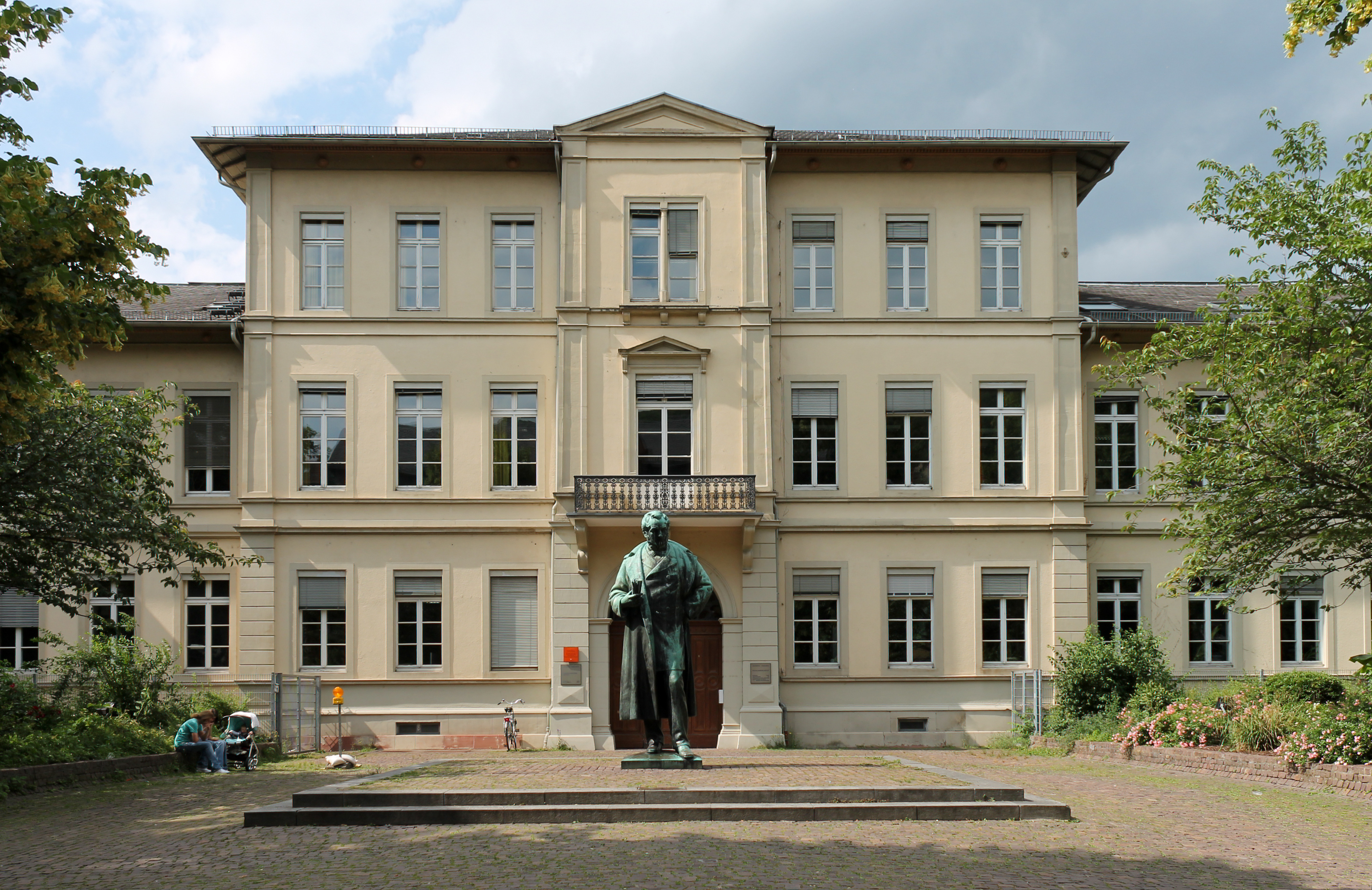 Friedrichsbau in Heidelberg, Sitz des Psychologischen Instituts